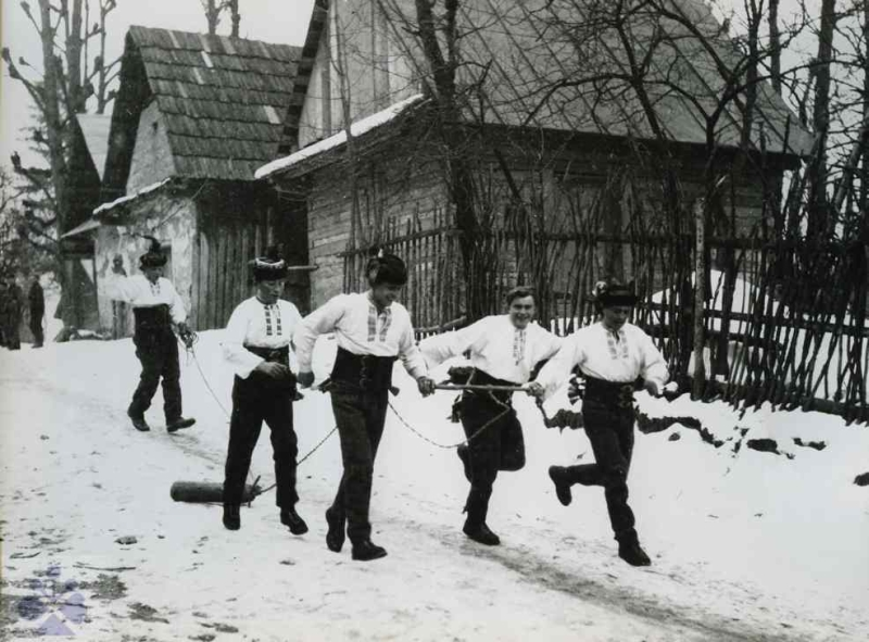 Обычай «тягать колодку» в Словакии